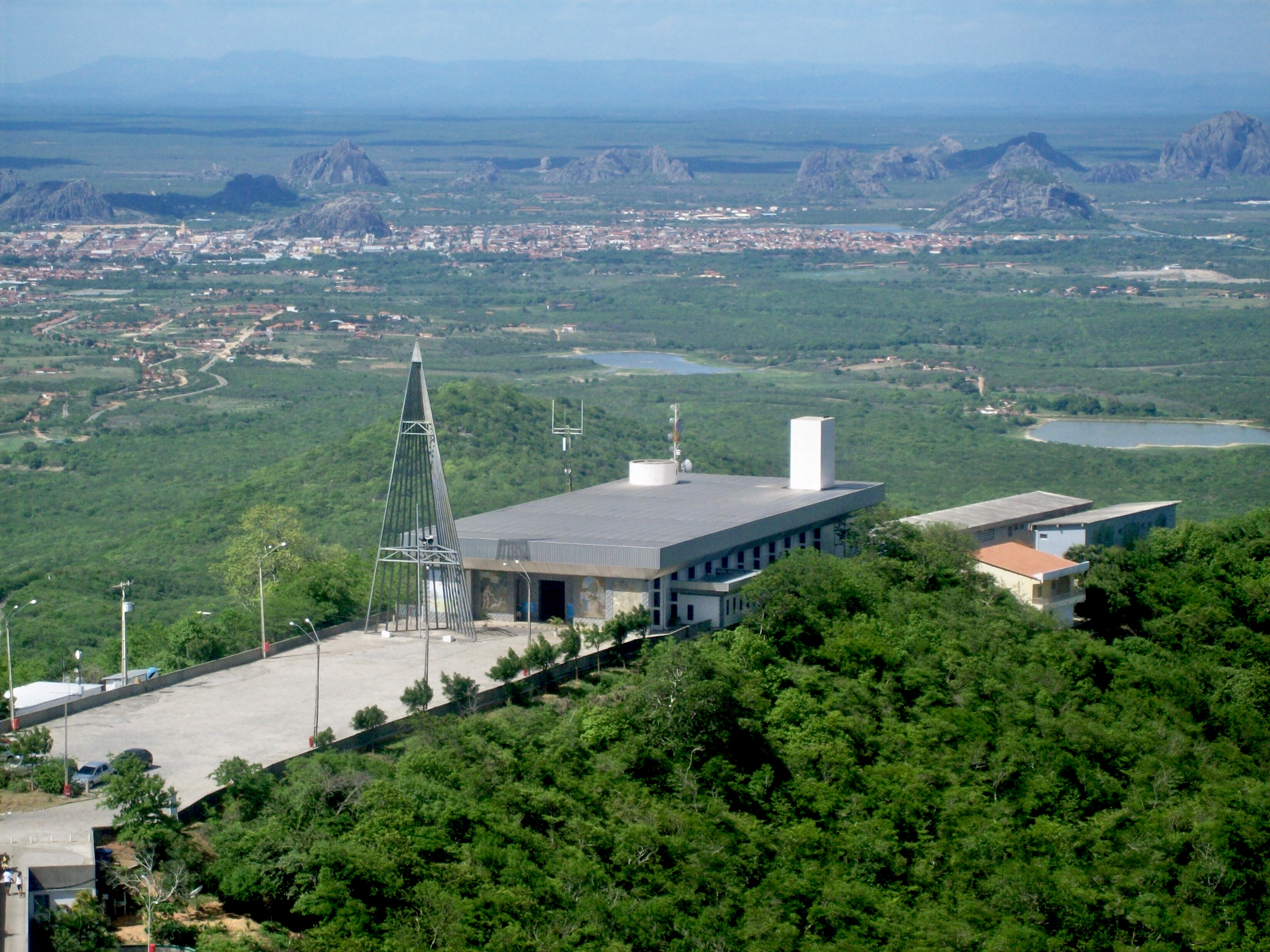 Quixadá CE Brasil - Santuário Rainha do Sertão